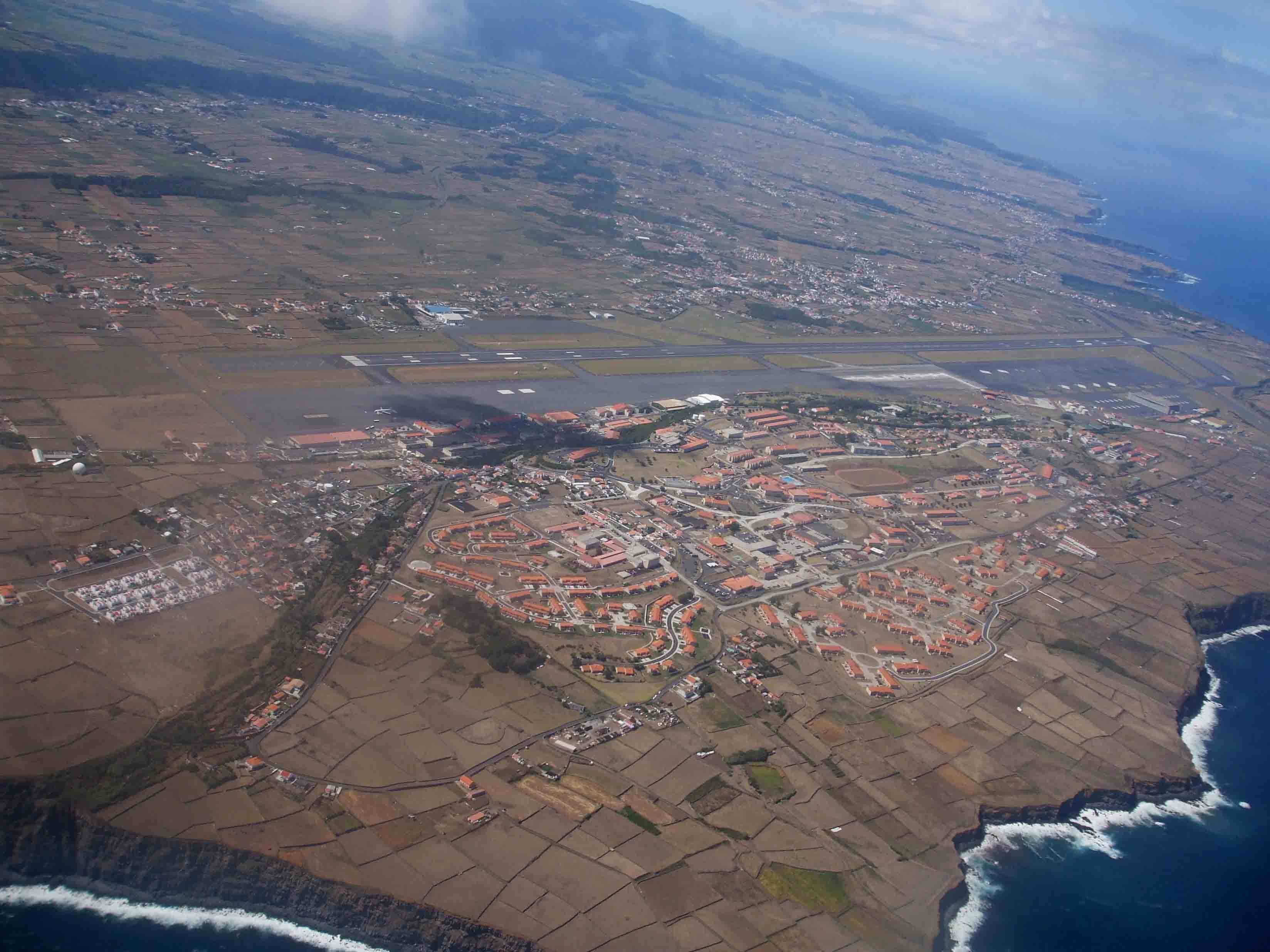 Aeroporto das Lajes, costa Norte da ilha Terceira, Açores, Portugal.